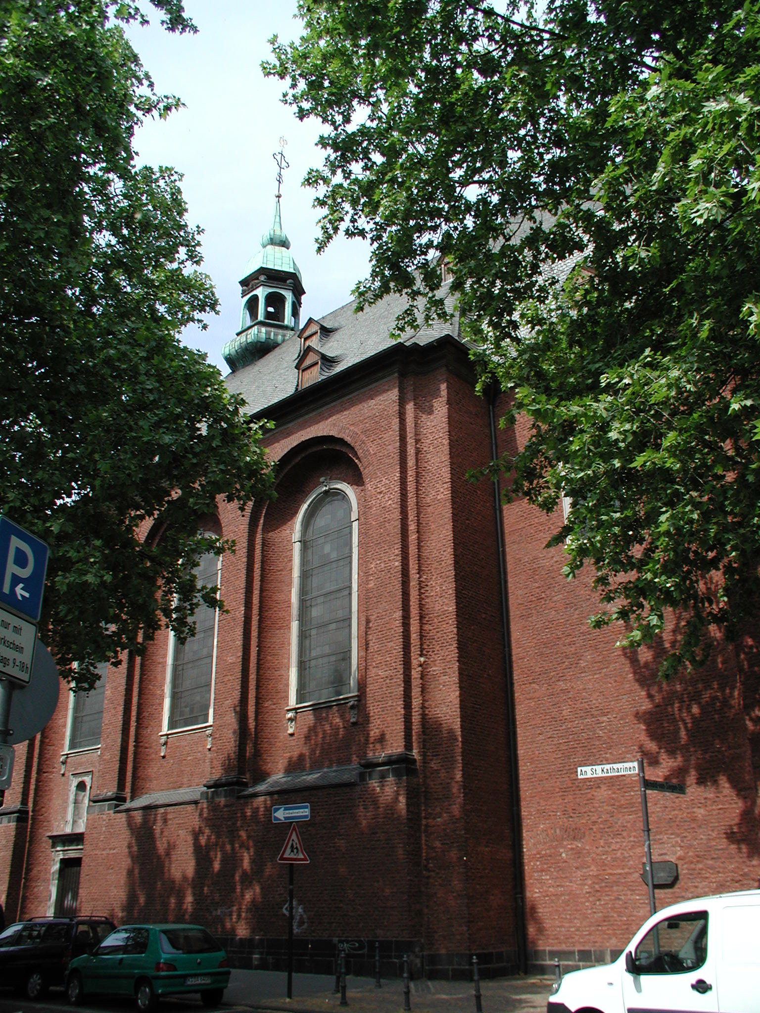 Köln, St. Gregorius - Elendskirche